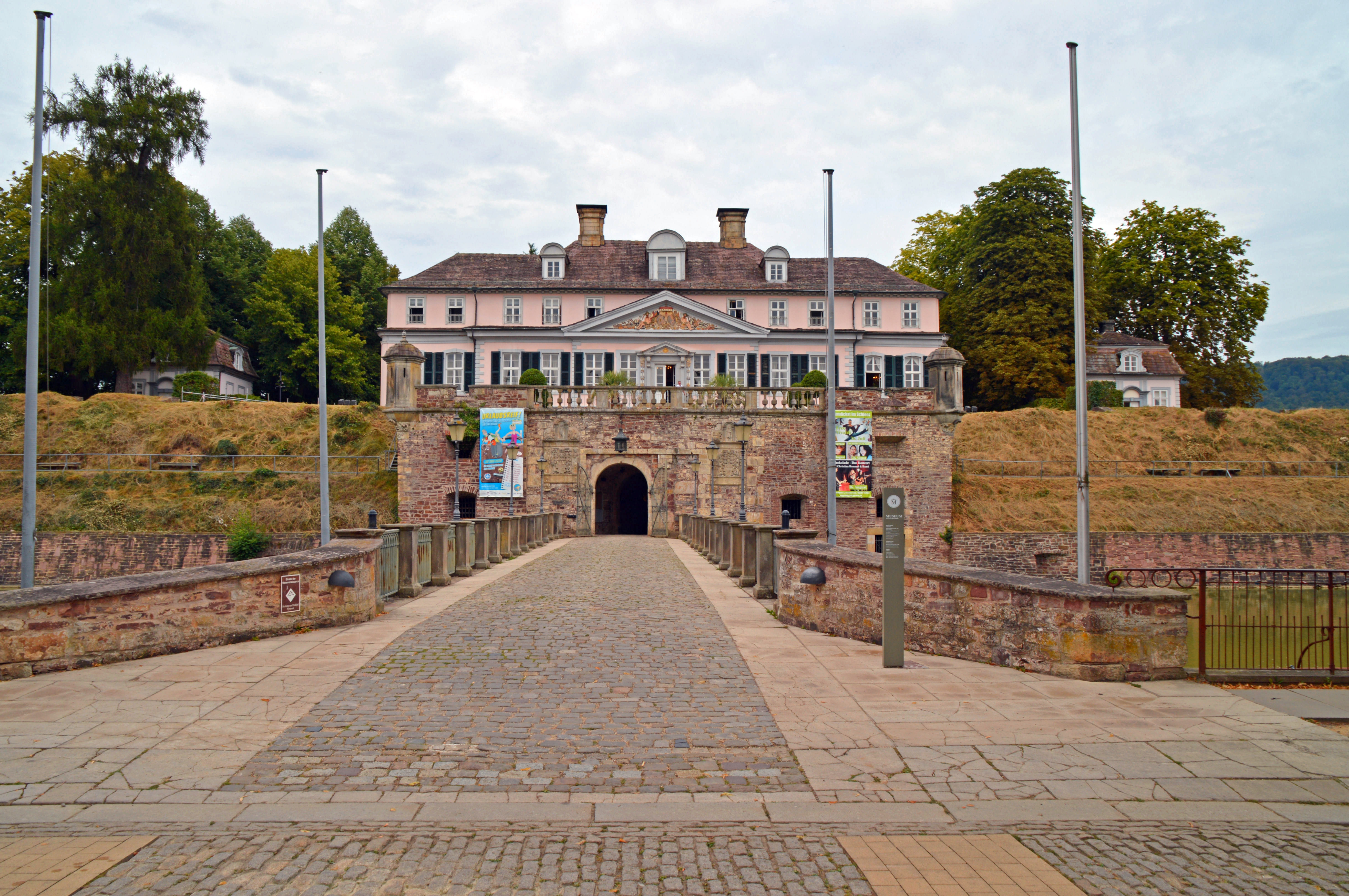 Bad Pyrmont Kasteel Pyrmont Castle Schloss Pyrmont Deutschland Germany Duitsland